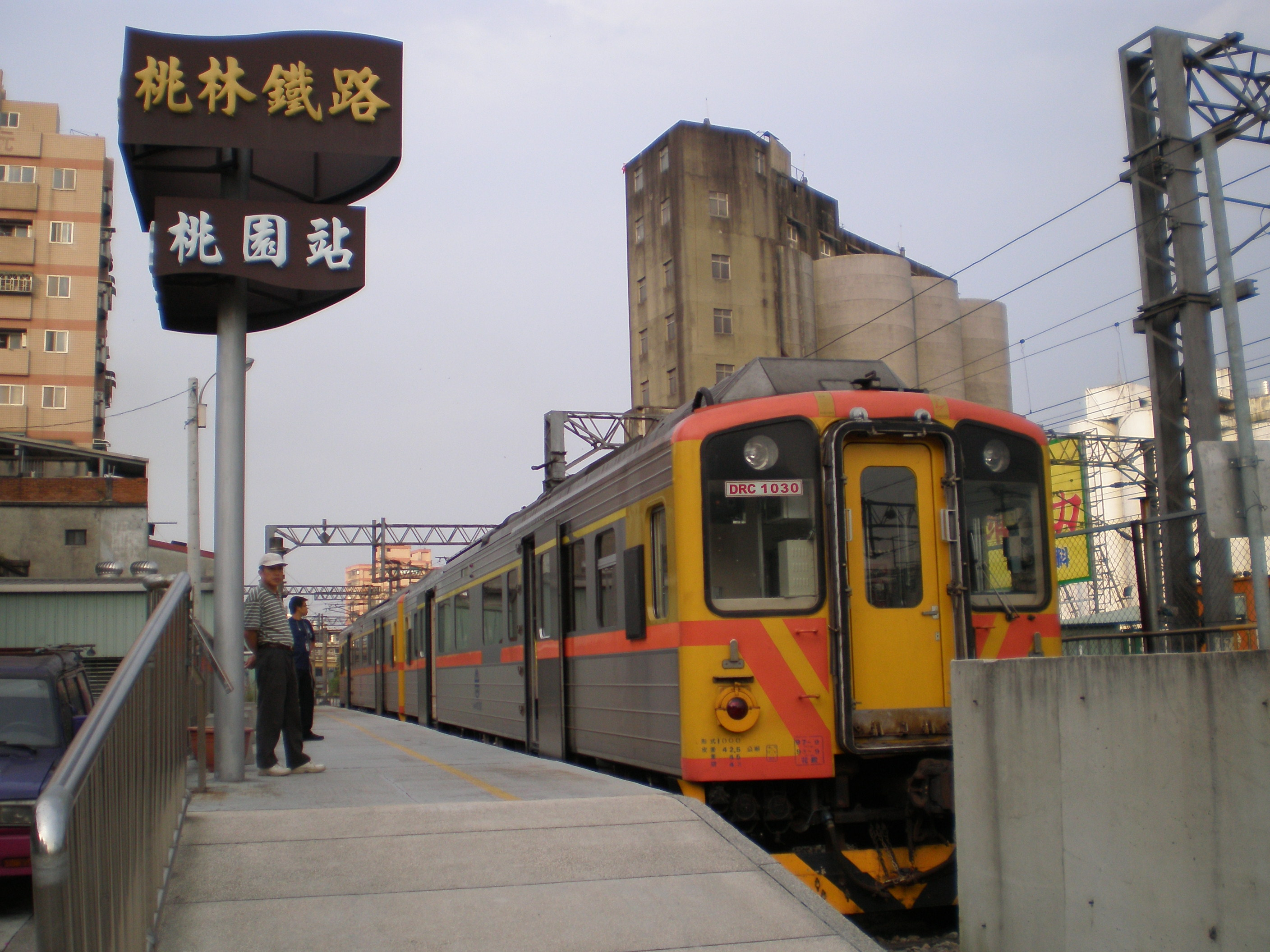 臺灣鐵路管理局桃園車站林口線月台與柴油車DRC1030。